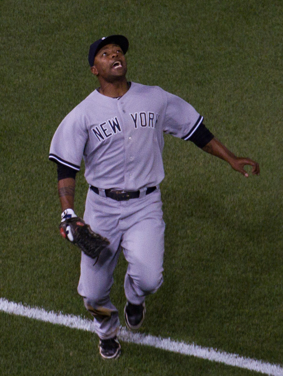 DeWayne Wise